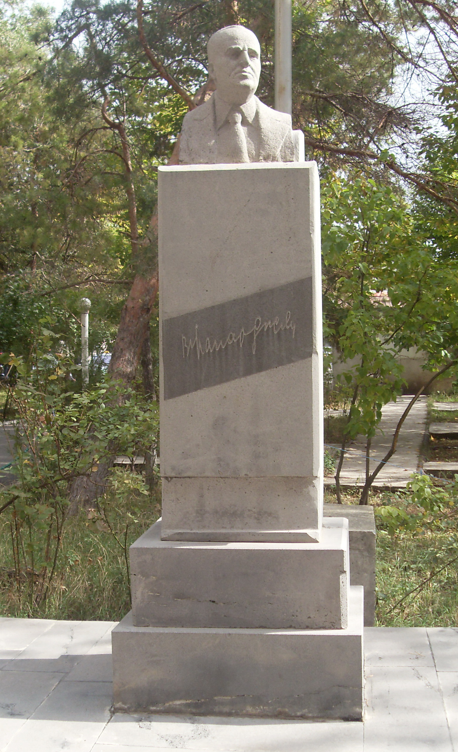 Հայ ռենտգենաբան, ՀԽՍՀ ռենտգենառադիո-ուռուցքաբանական ծառայության հիմնադիրը, ՀԽՍՀ ԳԱ ակադեմիկոս (1956), ԽՍՀՄ ԲԳԱ թղթակից անդամ (1960), ՀՍՍՀ գիտության վաստակավոր գործիչ (1940), Հայաստանում ռենտգենոլոգիայի և ռադիոլոգիայի հիմնադիր Բարդուղիմեոս Ֆանարջյանի (1898 - 1976) կիսանդրին նրա անվան ուռուցքաբանության կենտրոնի առջև